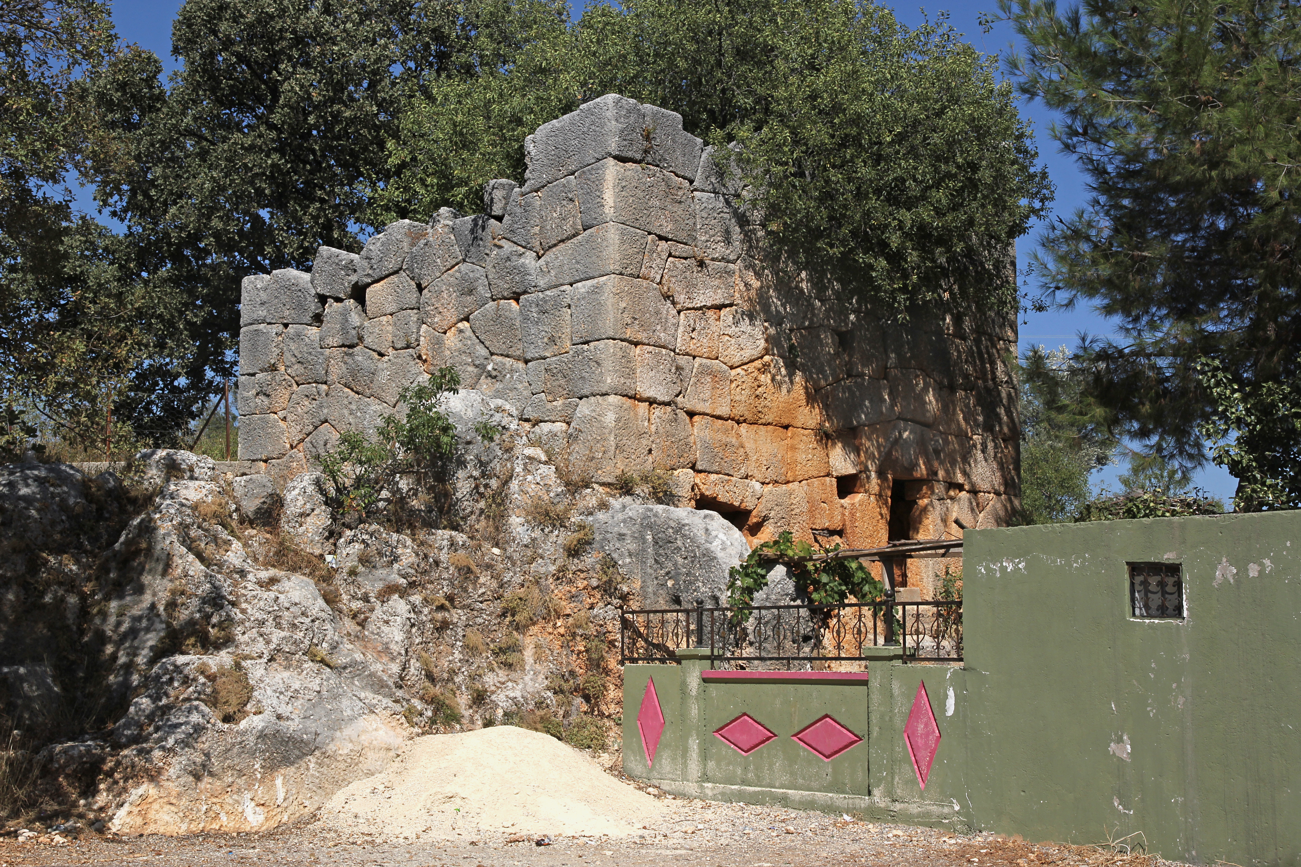 Kilikischer Turm von Hançerli bei Kızkalesi in der Südtürkei